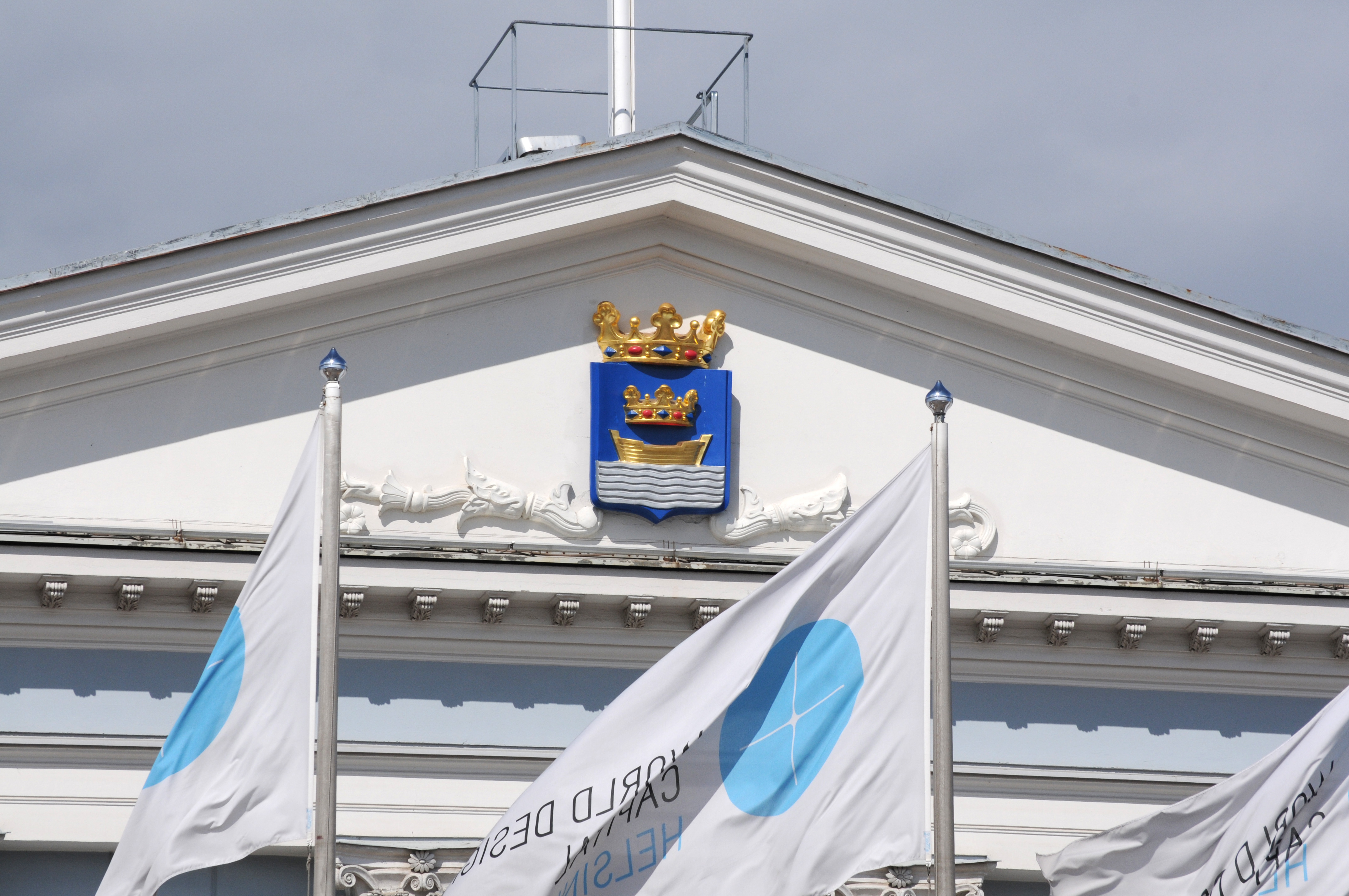 Helsinki